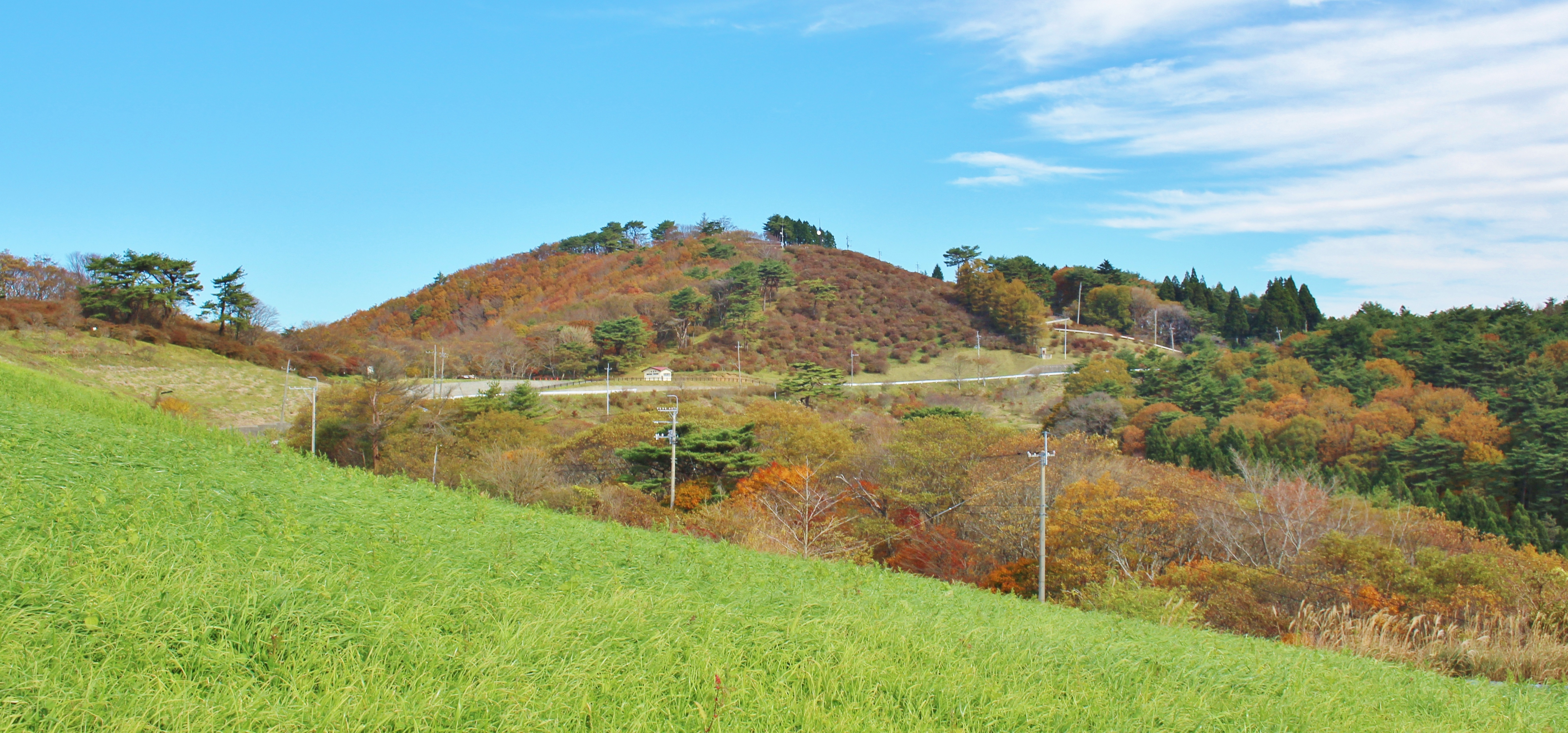 南三陸町 霊峰 田束山